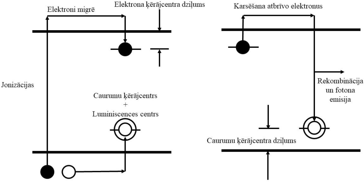 TSL process